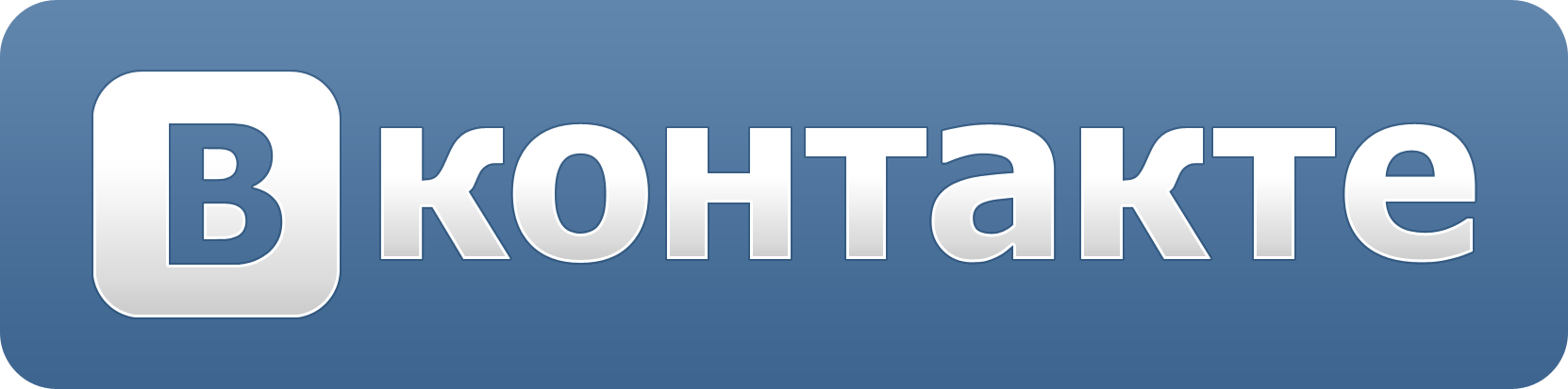 Logo vkontakte.ru